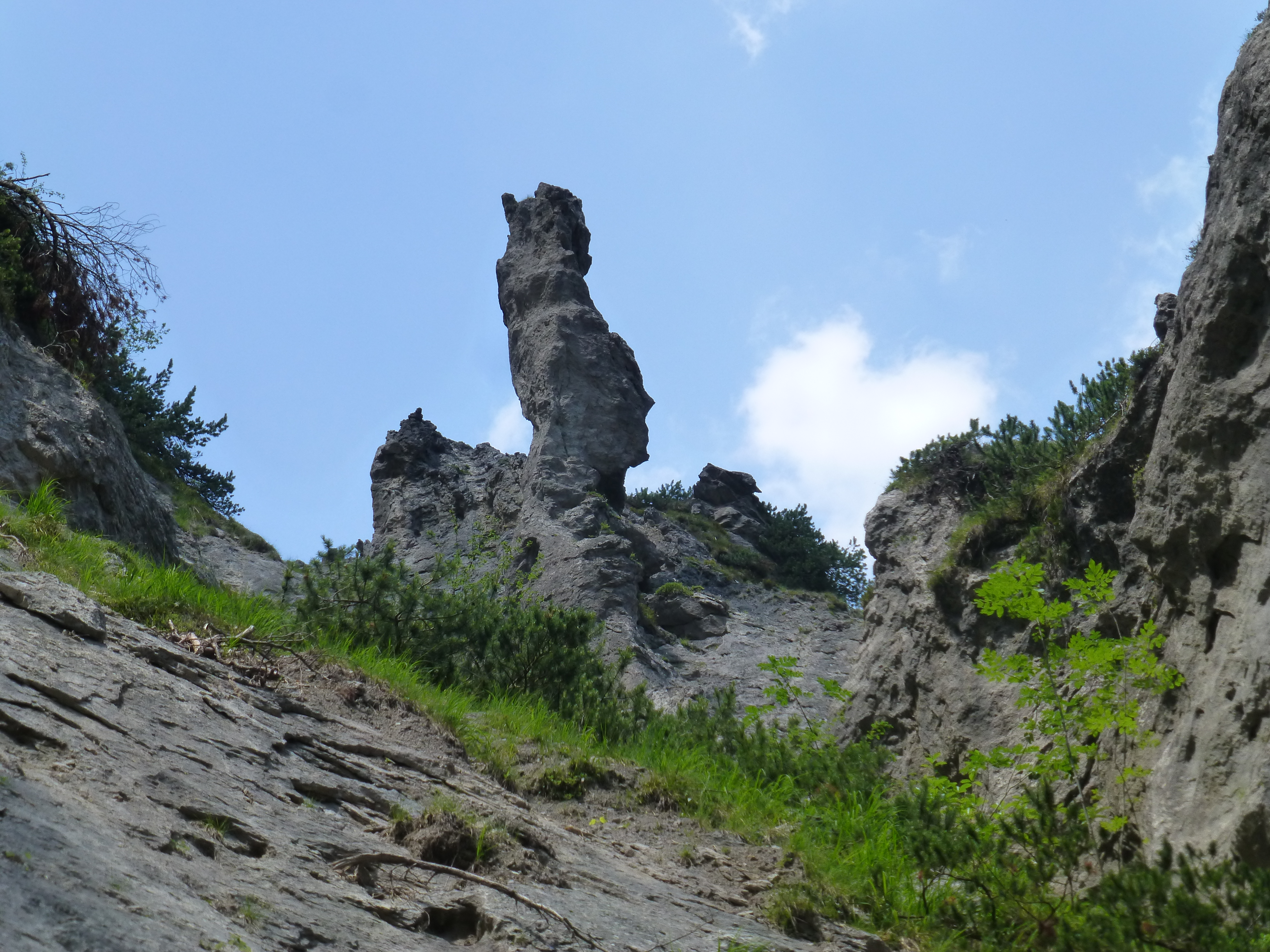 Kopfähnliche Felsformation in der Geißlochklamm